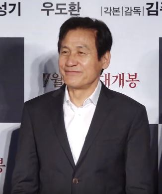 영화 '사자' 제작보고회가 26일 오전 서울 광진구 자양동 롯데시네마 건대입구점에서 열렸다.